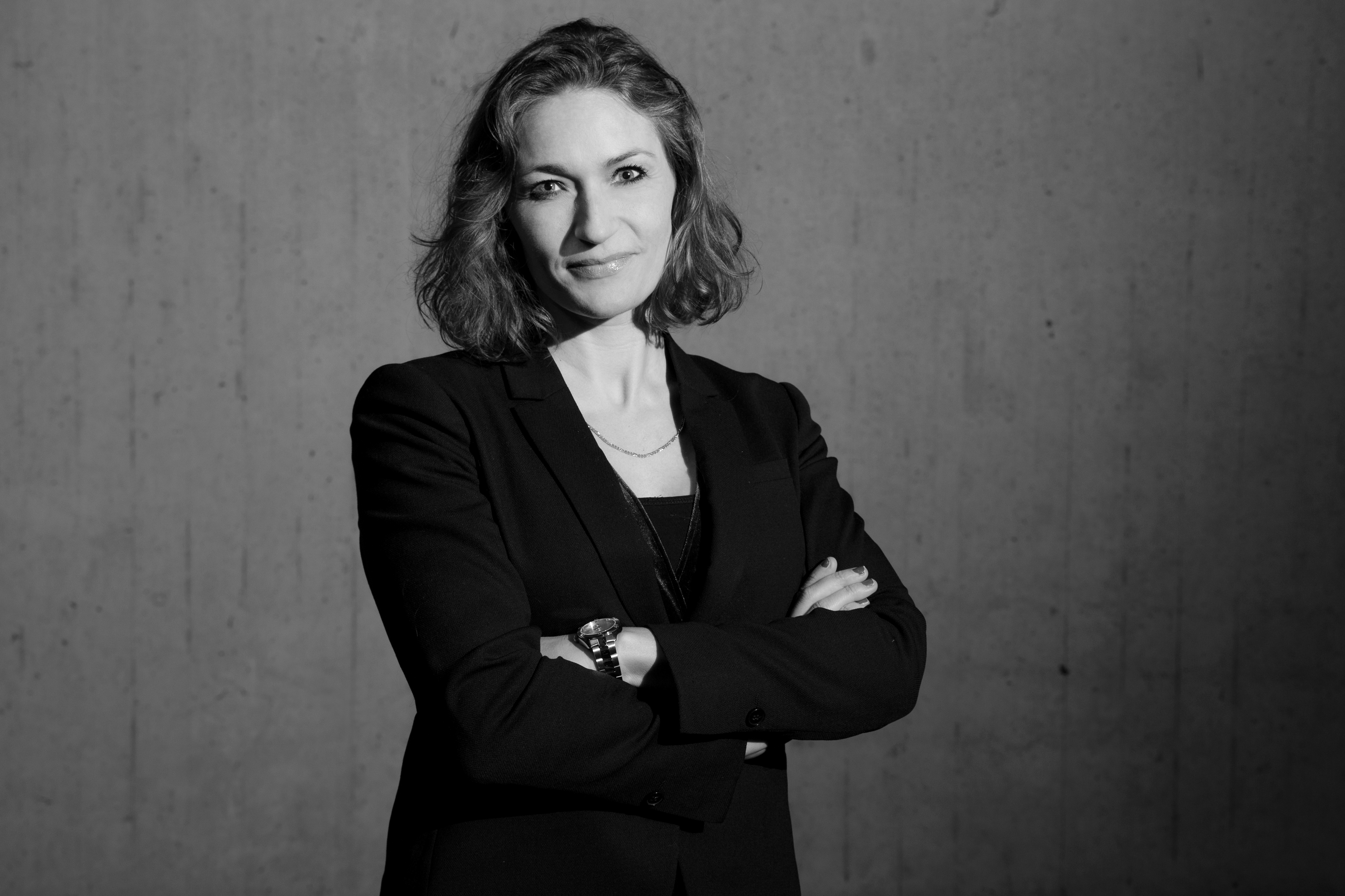 Mia Wagner. Foto: Trine Willer